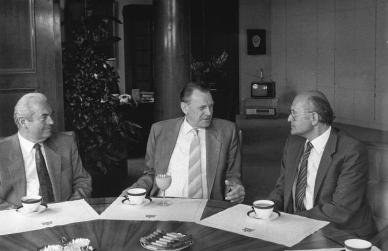 ADN-ZB Kluge 2.7.1987-A-BRD: Werner Eberlein in Niedersachsen. Der Oberbürgermeister Hannovers und Vorsitzende des "Deutschen Städtetages" der BRD, Herbert Schmalstieg (SPD, r.) empfing die in Niedersachsen weilende SED-Delegation unter Leitung von Werner Eberlein, Mitglied des Politbüros des ZK und 1. Sekretär der Bezirksleitung Magdeburg der SED (M.) zu einem Gespräch. L.: Ewald Moldt, Leiter der Ständigen Vertretung der DDR in der BRD."